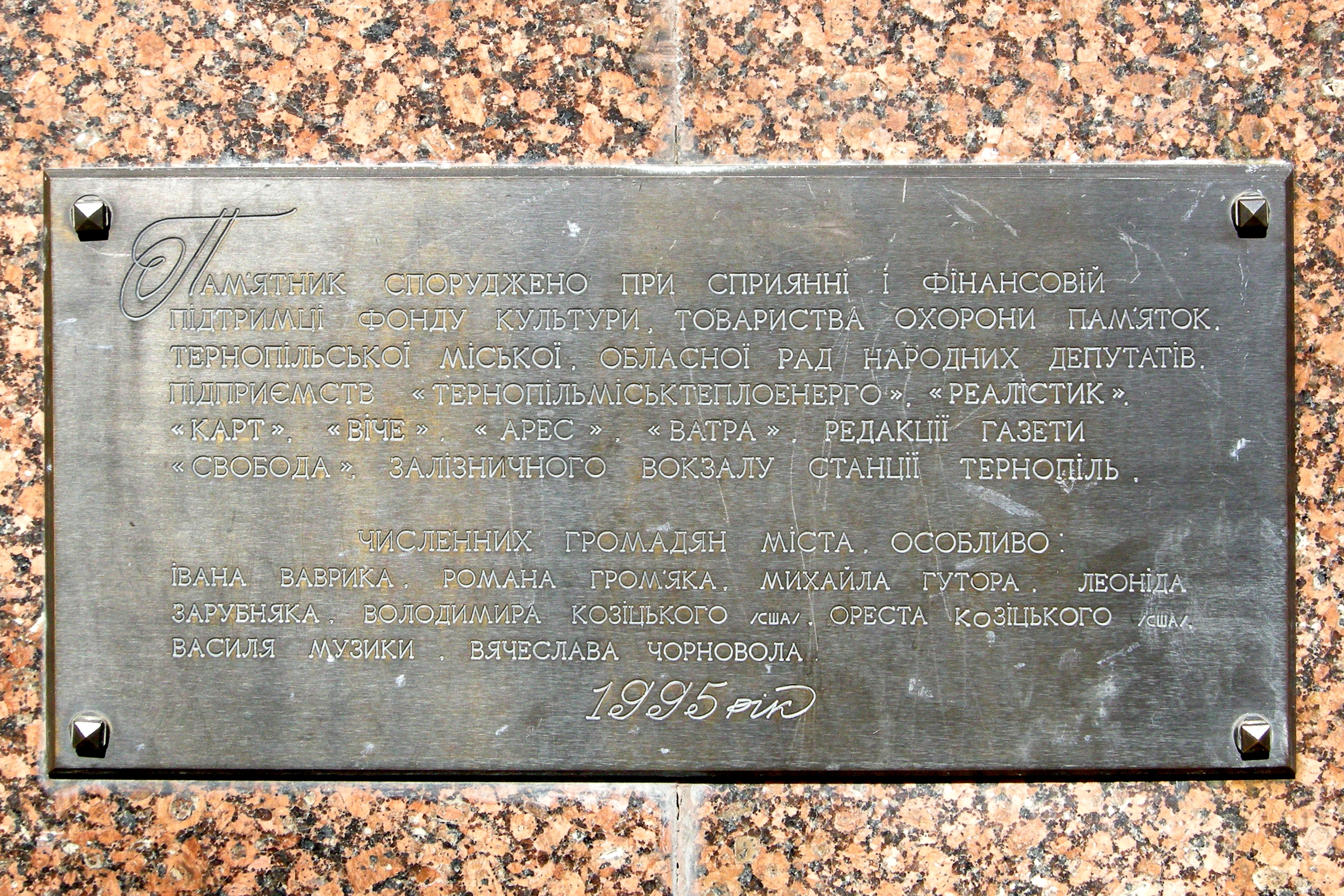 Таблиця з інформацією про фундаторів і меценатів спорудження аам'ятник Іванові Франку в Тернополі.